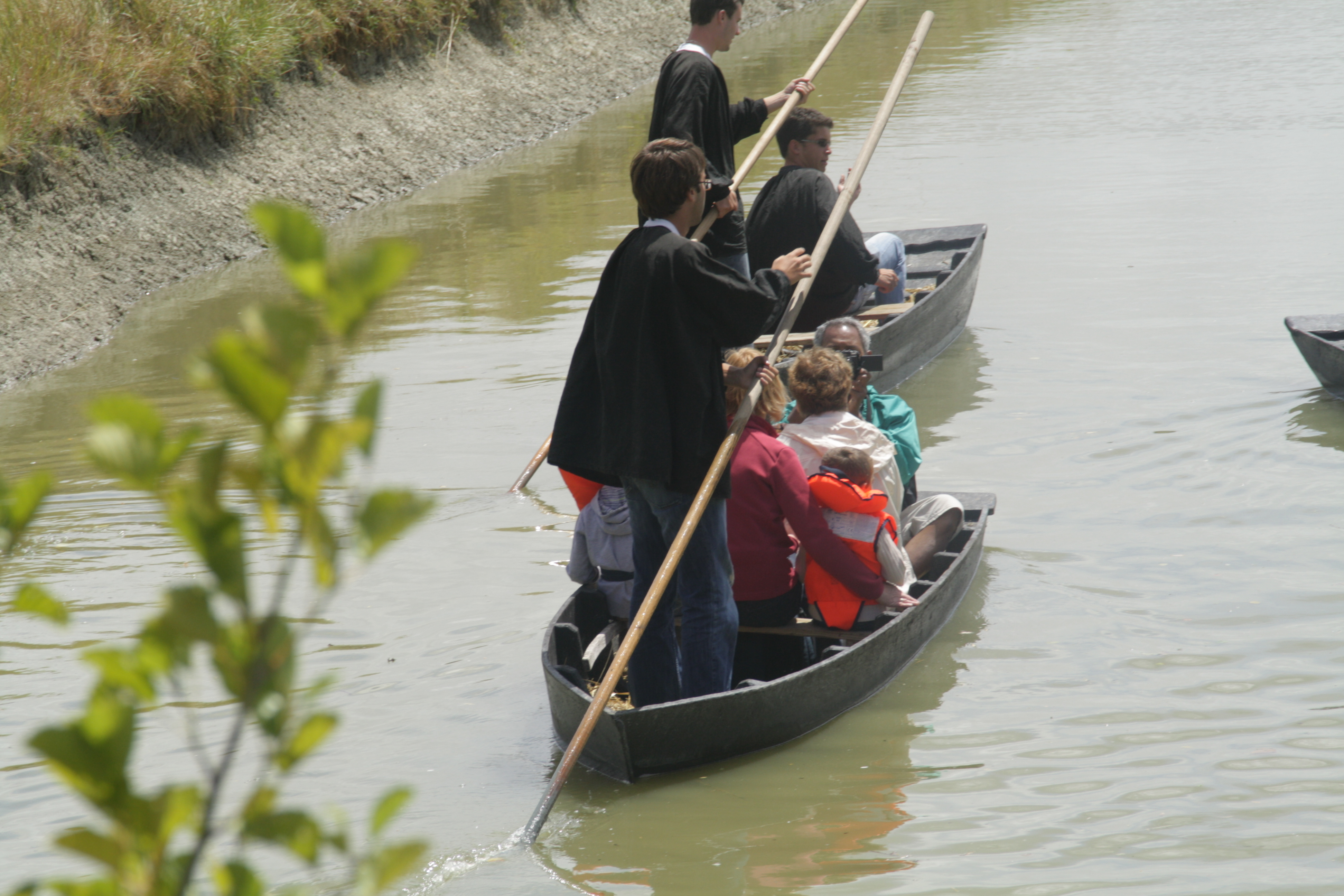 Le Perrier balade barque marais vendéen vendée 85